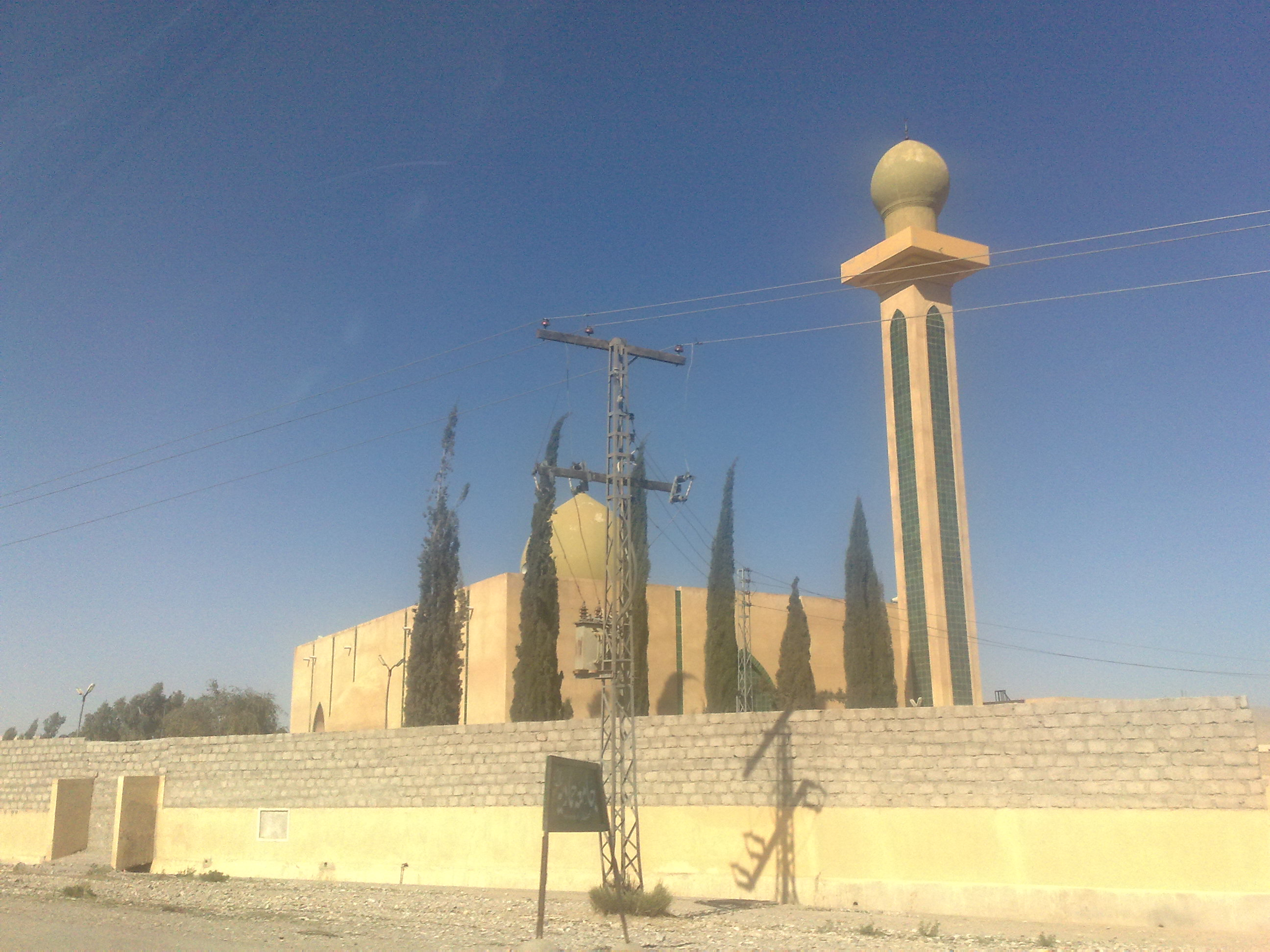 Khuzdar